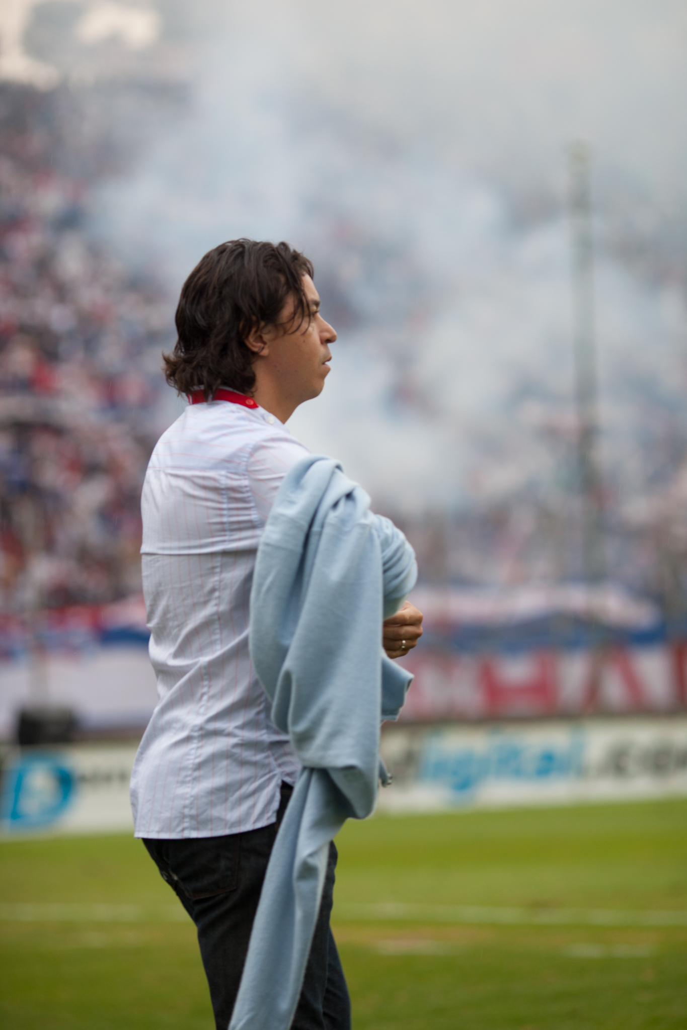 El Muñeco Gallardo, dirigiendo en Nacional